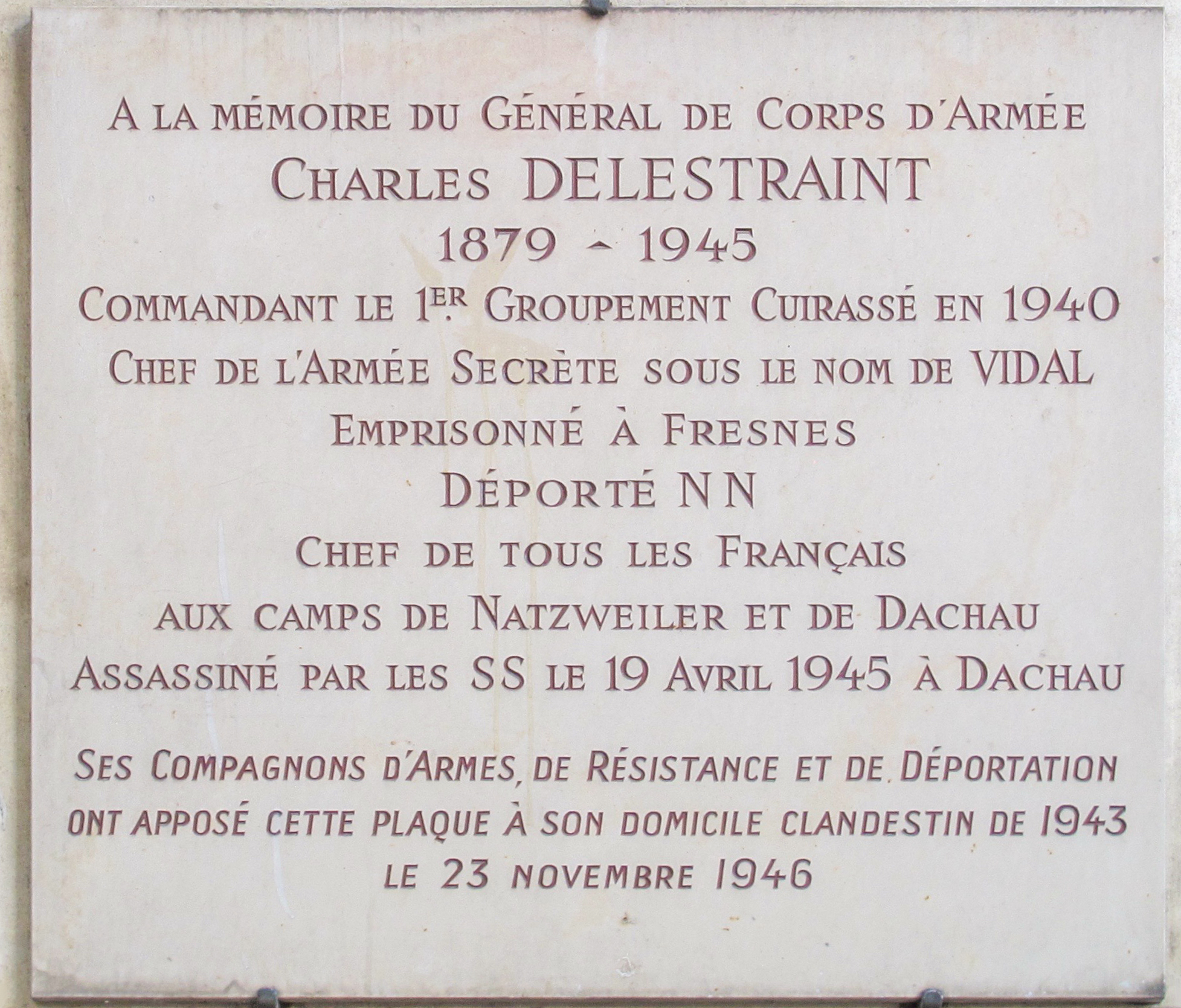 Plaque en hommage au général Delestraint, n°35 boulevard Murat (Paris, 16e).